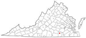 va maps